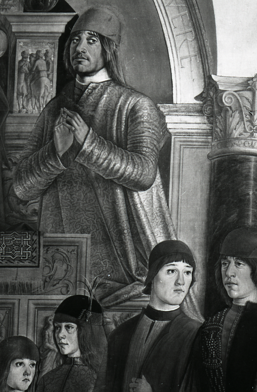 Servizio fotografico : Bologna, 1982 / Paolo Monti. - Strisce: 6, Fotogrammi complessivi: 32 : Negativo b/n, gelatina bromuro d'argento/ pellicola ; 35 mm. - ((Sul portanegativi: N[I]K[MA]T FP4. - N.B. Possibili sottoserie (2):. - - Pala Bentivoglio;. - - Trionfo della Morte. - Occasione: Documentazione della mostra realizzata per il restauro dei dipinti. - Fonte: Agenda di Paolo Monti: Nikon Leika 3001-/ Monti 1978 (1978-1982), presso Archivio Paolo Monti. - Fonte: Fattura di Paolo Monti: IV. Commesse/ Fattura n. 12/ Fotografie di quadri e affreschi restaurati (1982/06/29), presso Archivio Paolo Monti